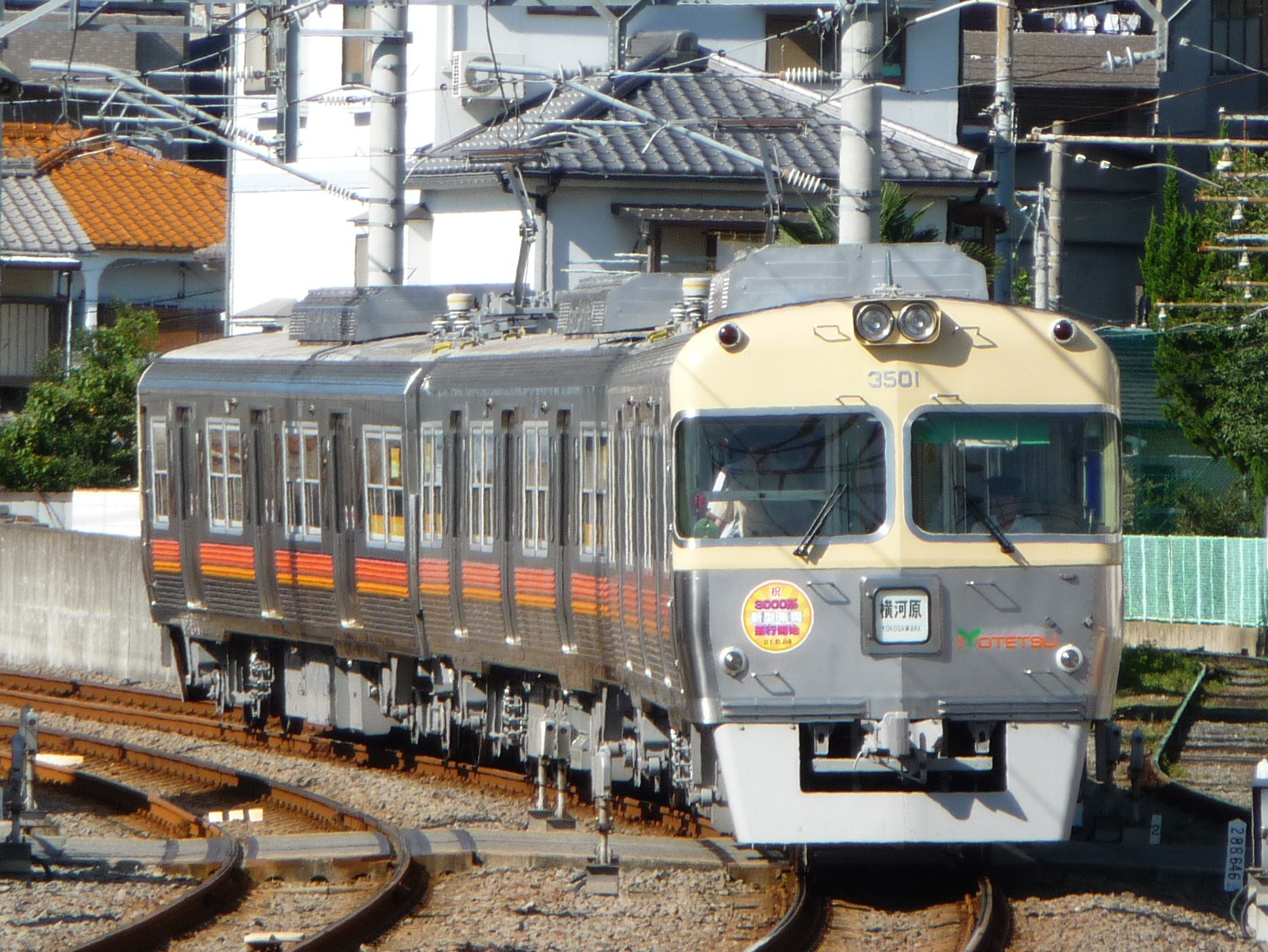 伊予鉄道3000系電車